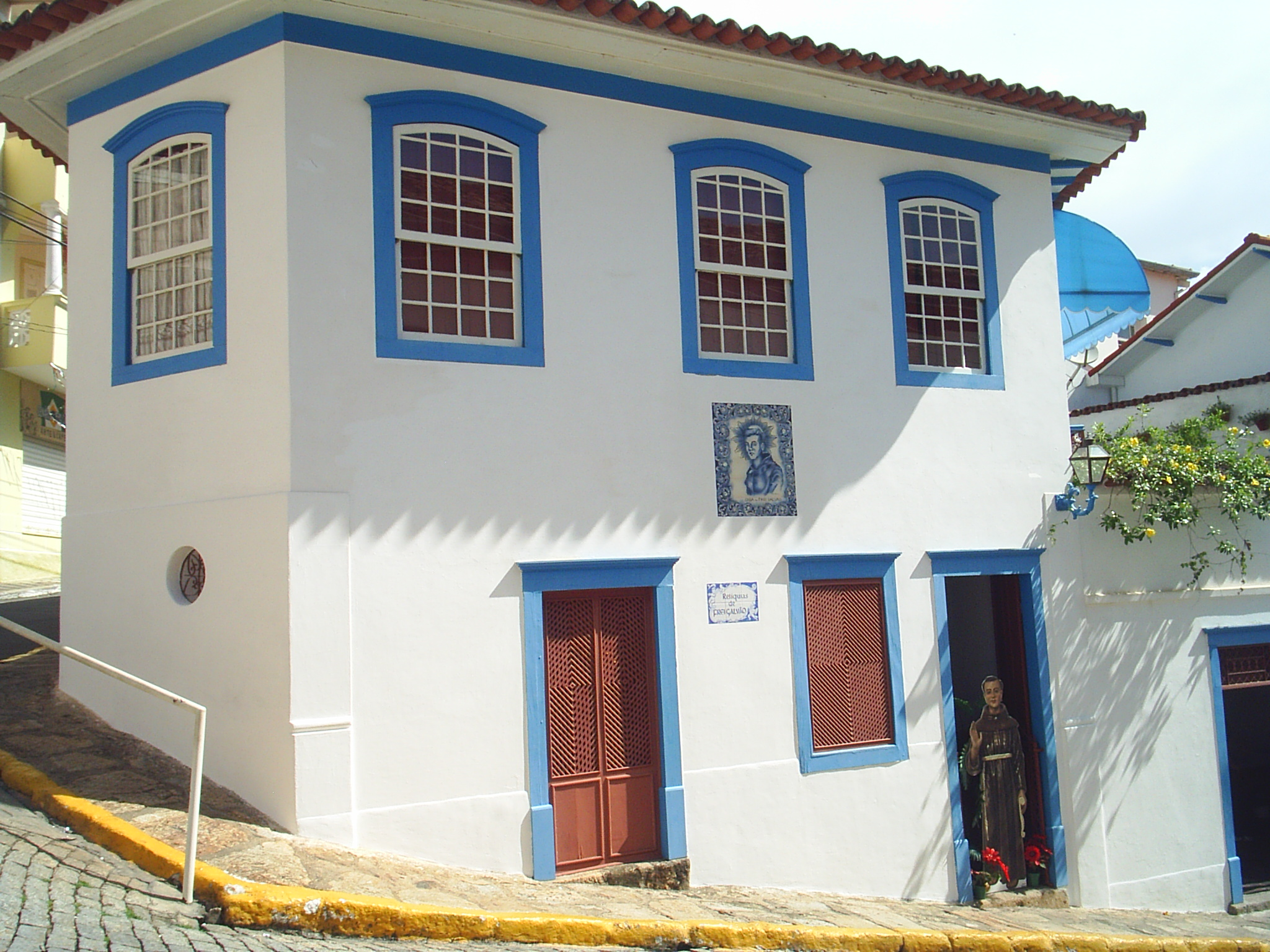 Casa onde Nasceu Frei Galvão, e onde hoje funciona um museu dedicado a ele, no Centro Histórico de Guaratinguetá.